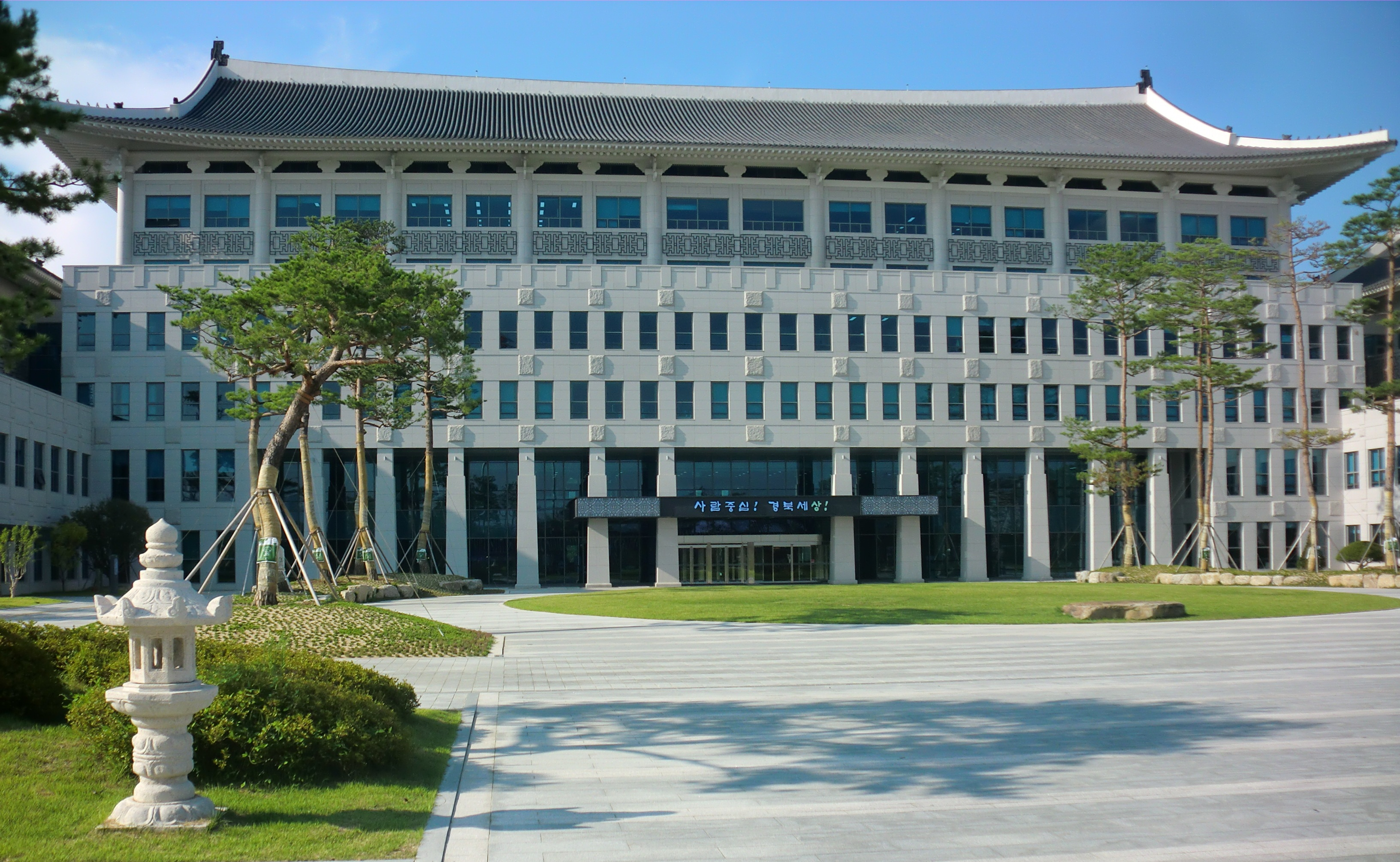 경상북도 안동시에 있는 경상북도청